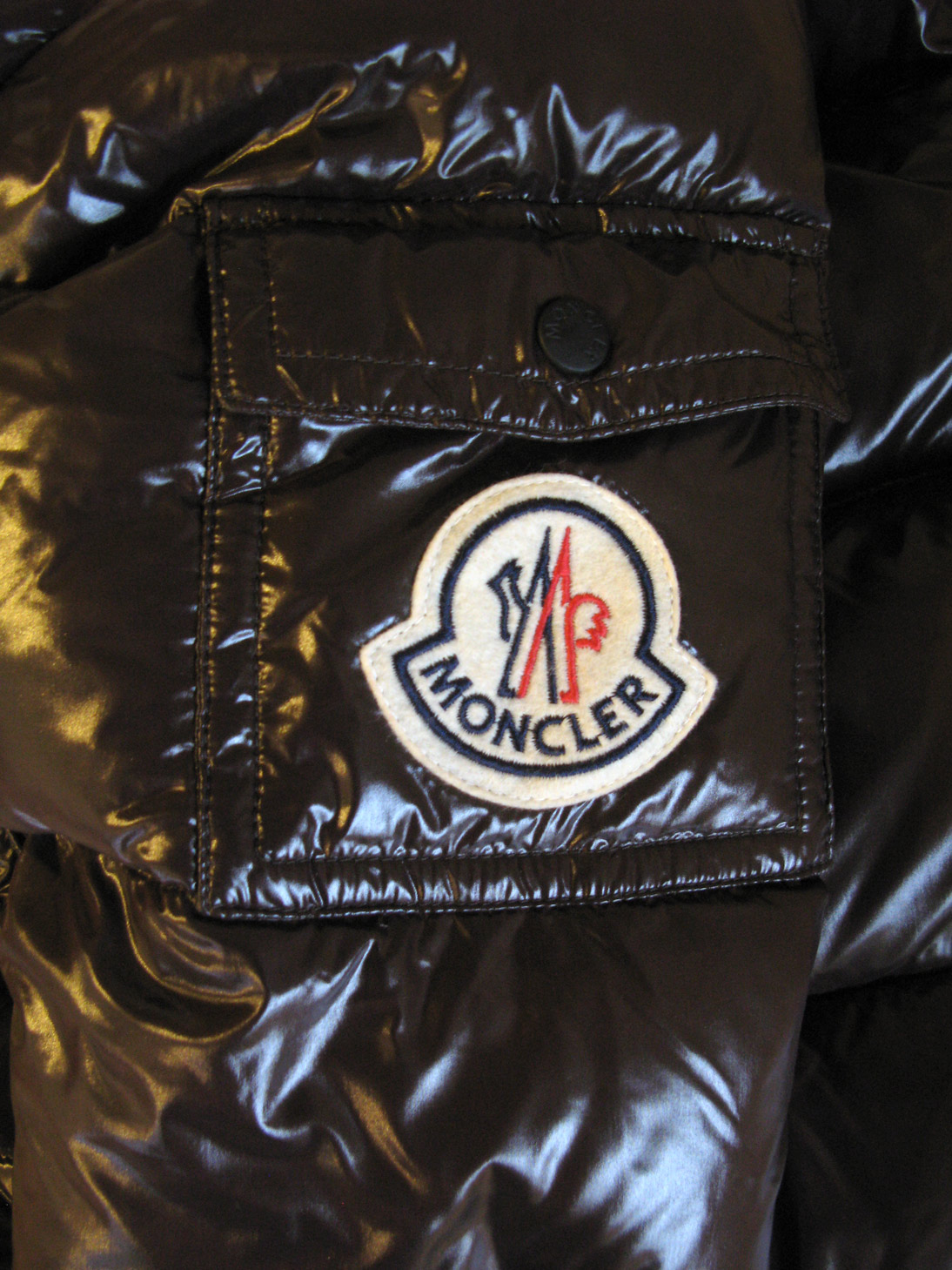 logo sur manche d'une doudoune (anorak) de marque Moncler, collection 2009